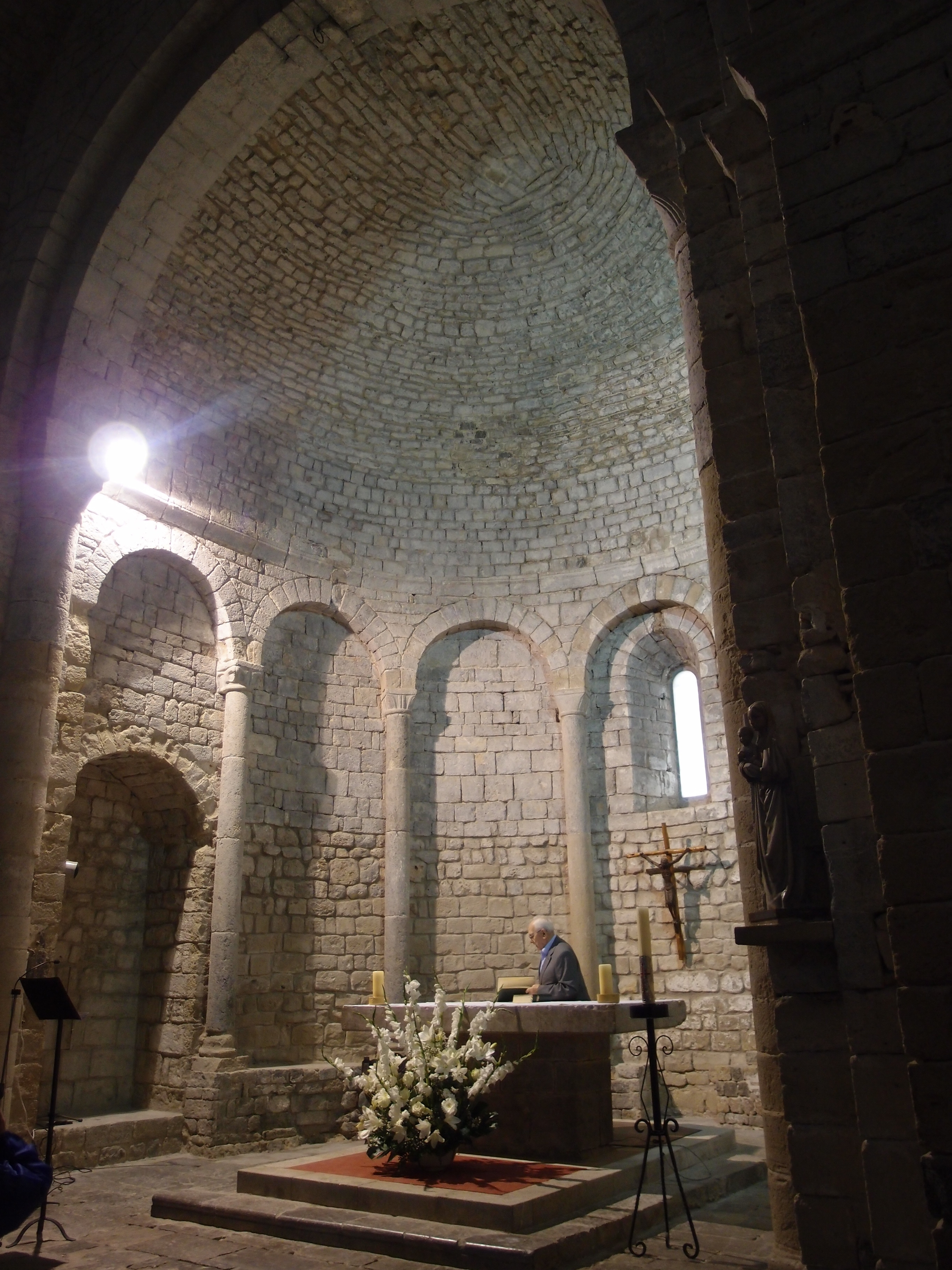 Kloster Santa Maria de Vilabertran - Apsis und Hauptaltar (Alt Emporda / Katalonien) Datum: 15.09.2013 Urheber: M. Pfeiffer alias Benutzer:Gordito1869 Quelle: privates Fotoarchiv des Urhebers